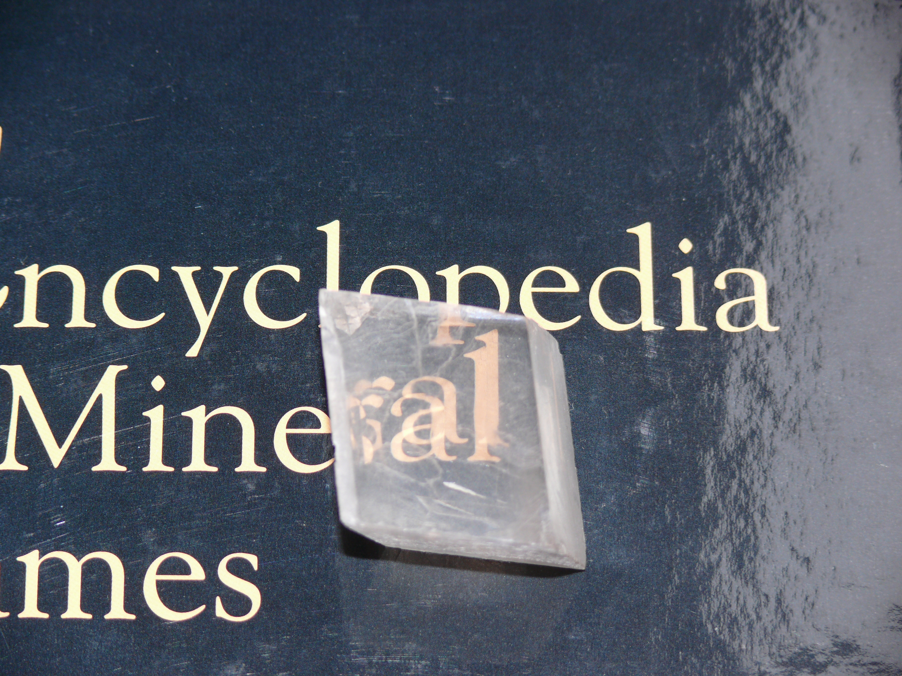 Doppelspat